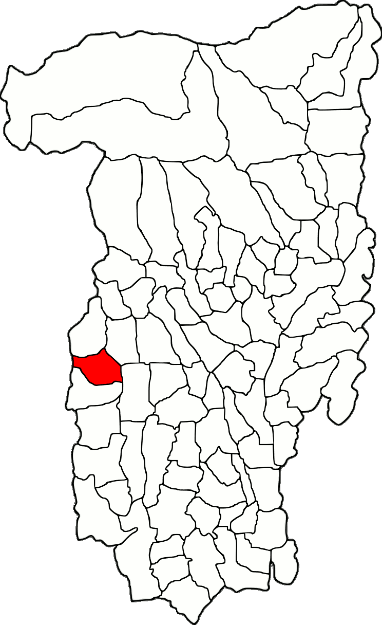 Lage der Gemeinde Sinești im Kreis Vâlcea (RO).